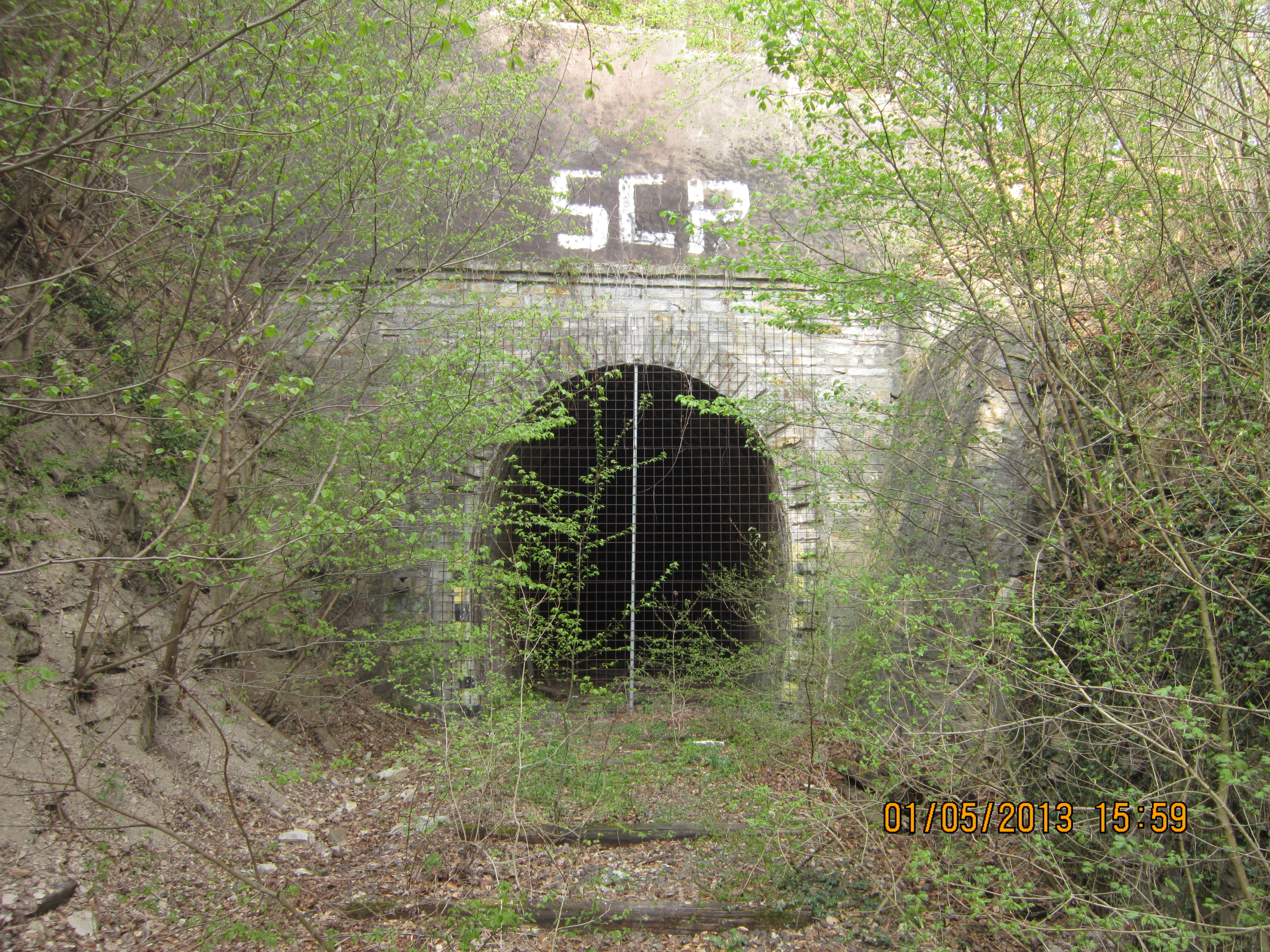 Südportal des Wewelsburger Tunnel mit einer Länge von 143 Meter.